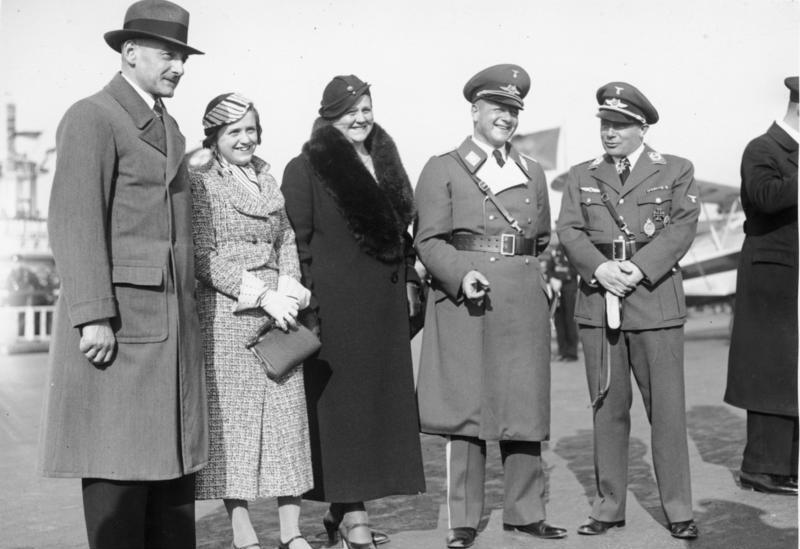 Scherl Riesen Volks Flugtag Ostern 1934 auf dem Tempelhofer Feld [in Berlin 1934] von links: Bürgermeister Maretzki, Staatssekretär Milch mit Gattin und Tochter und Udet. 12031-34